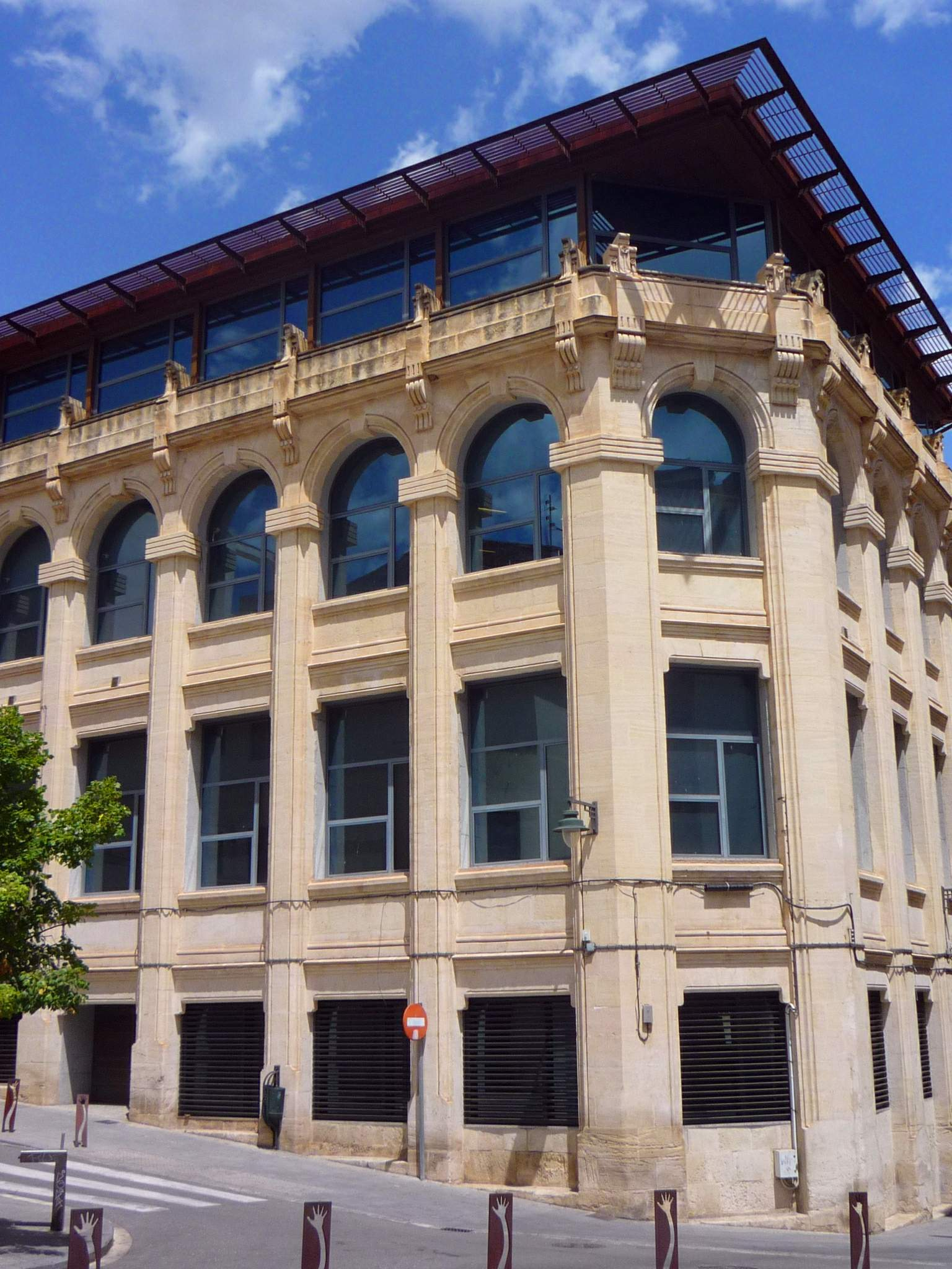 Alcoy - Universitat Politécnica de Valencia, Campus de Alcoy